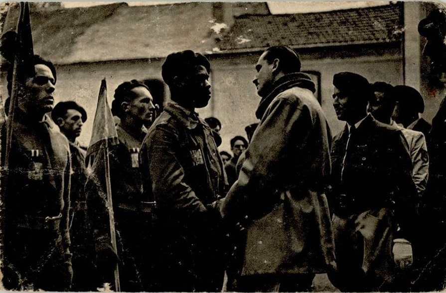 Carte postale de propagande du régime de Vichy. Inscription au verso : "Dans un chantier de jeunesse M. Lamirand s'entretient avec un jeune de l'empire. Photo Secrétariat général de la Jeunesse. "Vous serez résolument, complètement, définitivement unis derrière notre chef à tous : le Maréchal" (Lamirand)".